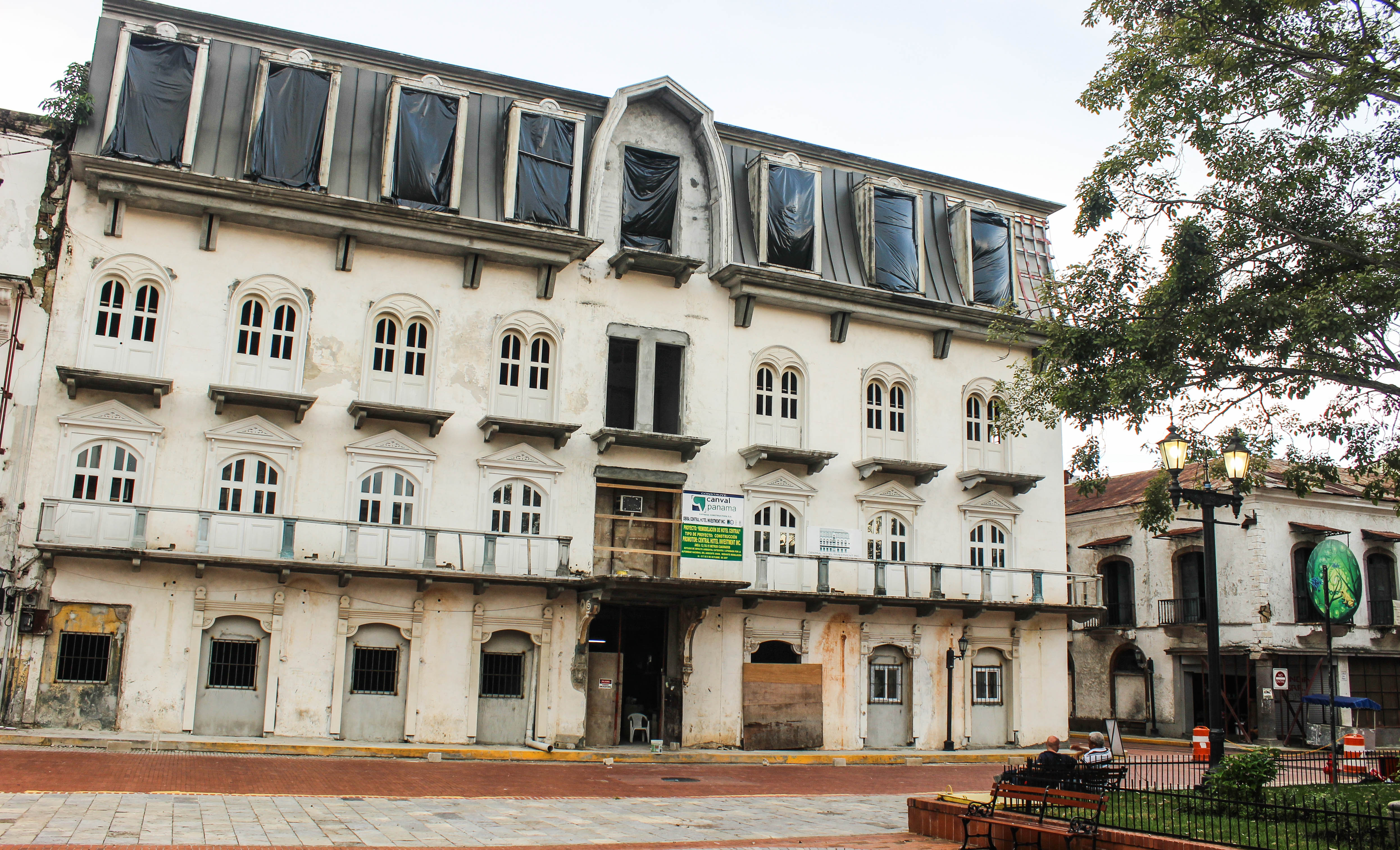 Hotel Central frente a la plaza de la independencia.